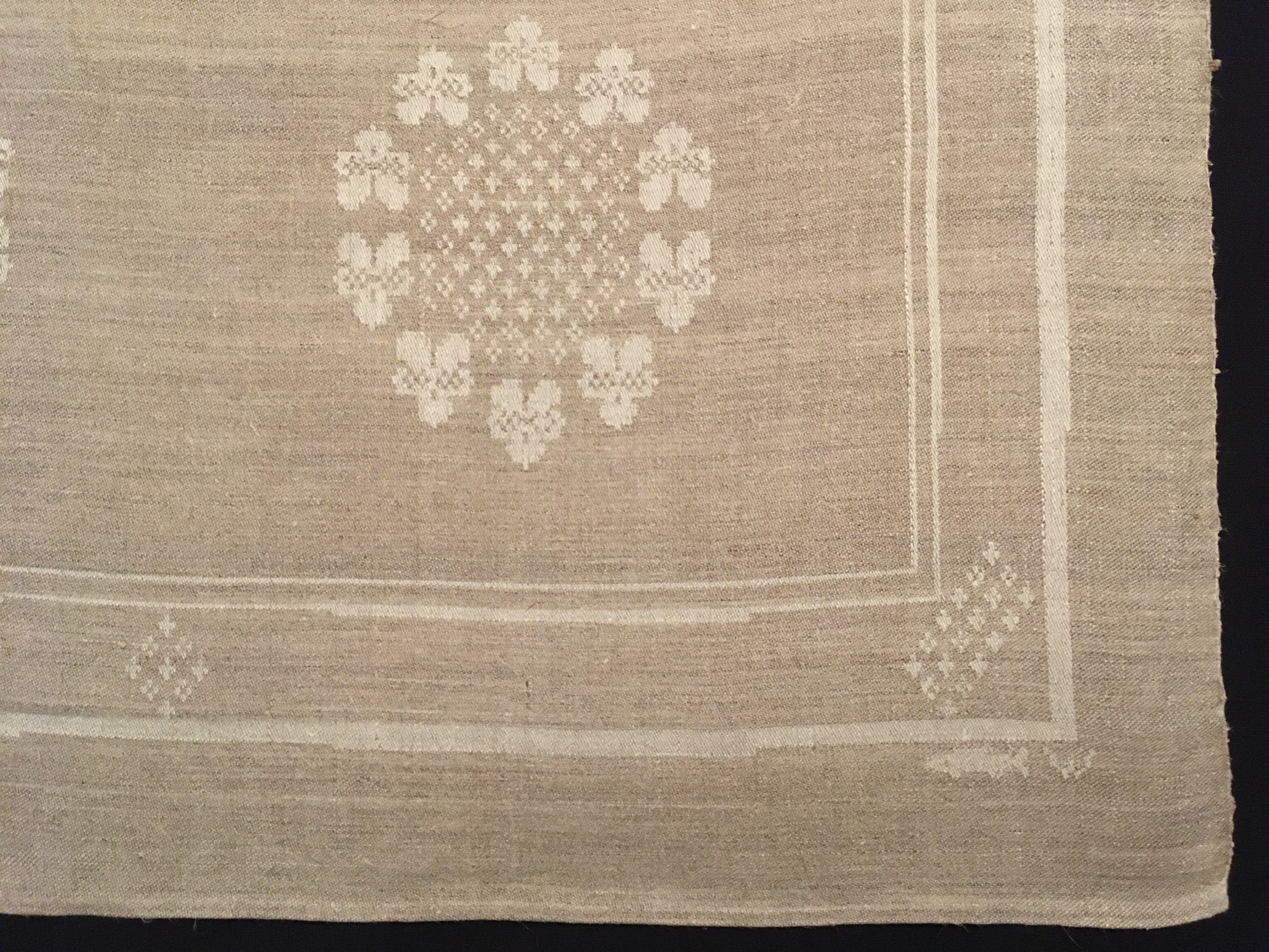 Liten damastduk av Emma Wiberg